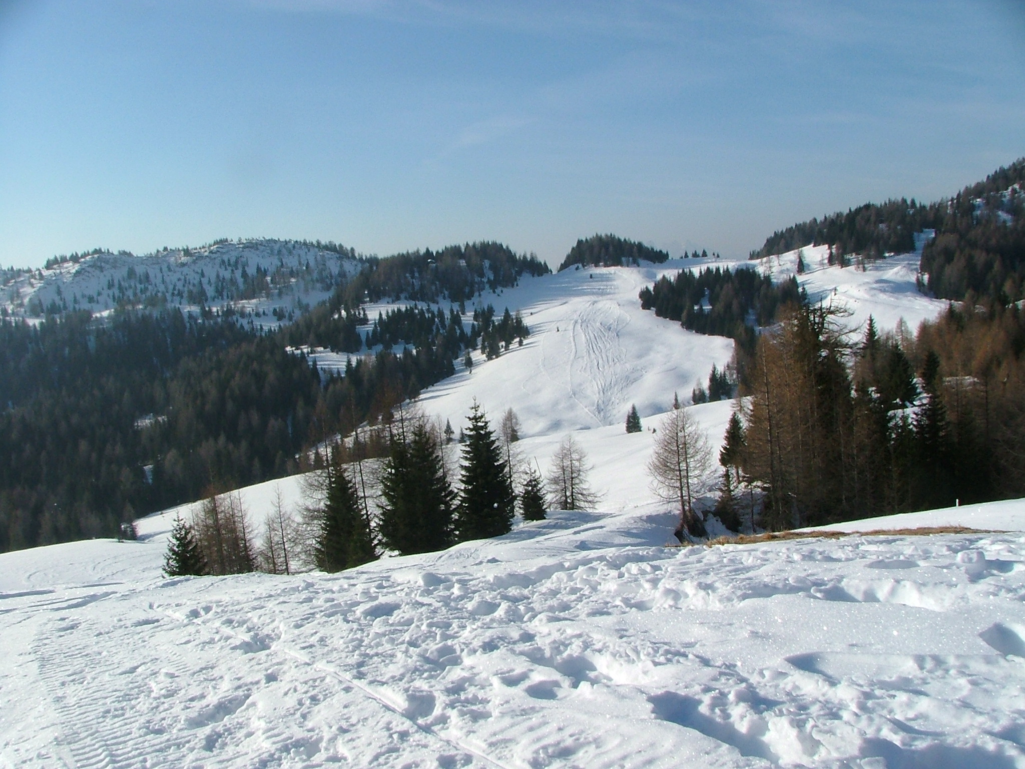 Pian dei buoi, Marmarole, Lozzo di Cadore, Belluno, Italy